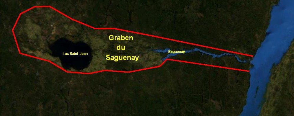 Image du Graben du Saguenay au Québec.